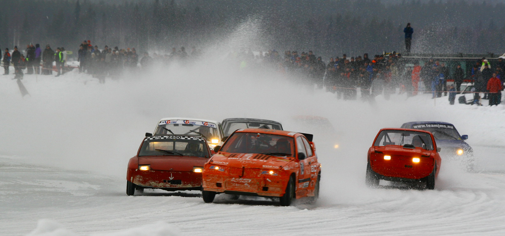 Schwedens Eisrennen-Meister 2007 Fredrik Tiger im BMW Compact.